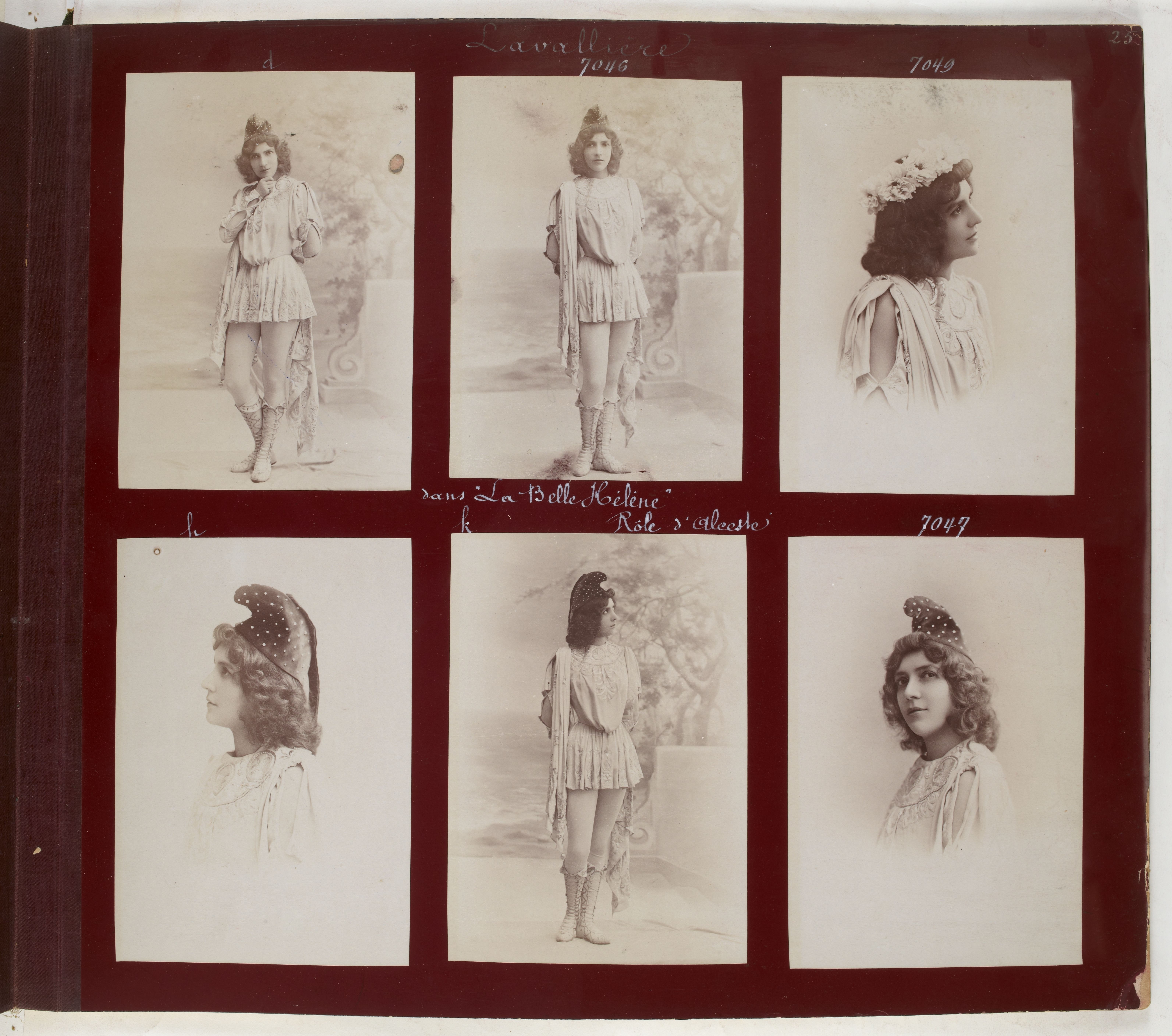 Album Reutlinger de portraits divers, vol. 1. Ève Lavallière dans "La Belle Hélène". Rôle d'Alceste.